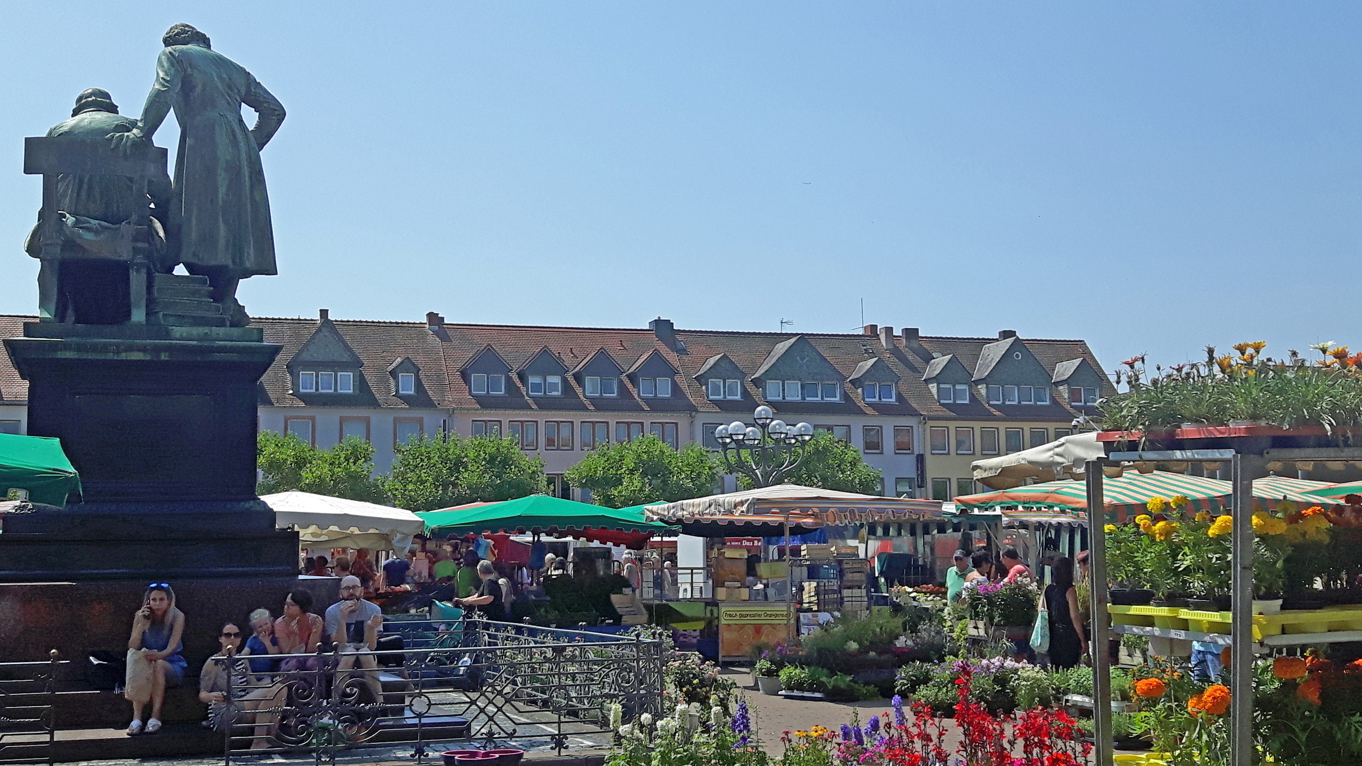 Blick vorbei am Brüder-Grimm-Nationaldenkmal über den Wochenmarkt auf die Südseite des Platzes mit farbenfrohen Fassaden, die an die historische Bebauung erinnern